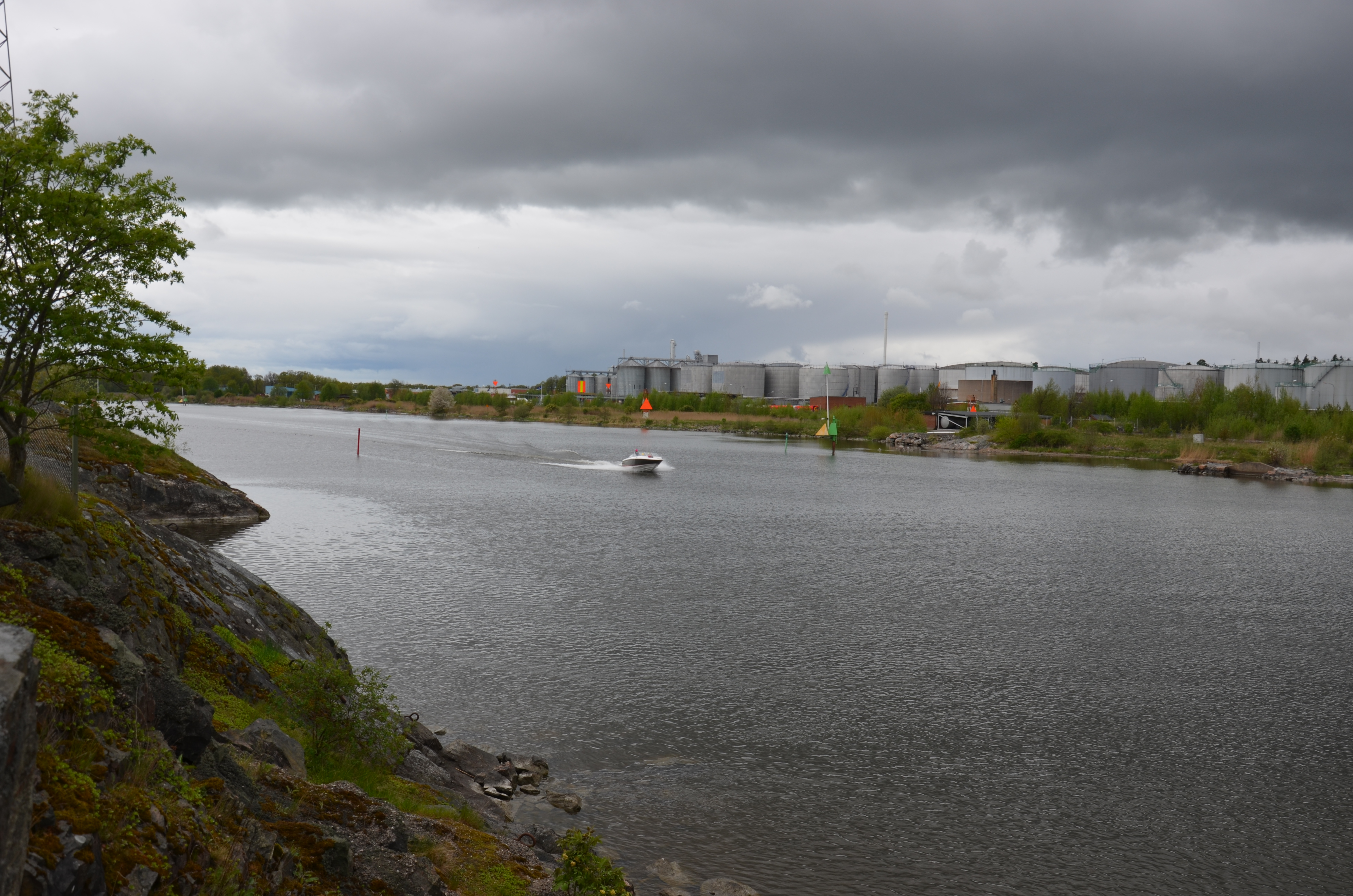 Lindökanalen in Norrköping. Photo taken on Lindö, towards west.